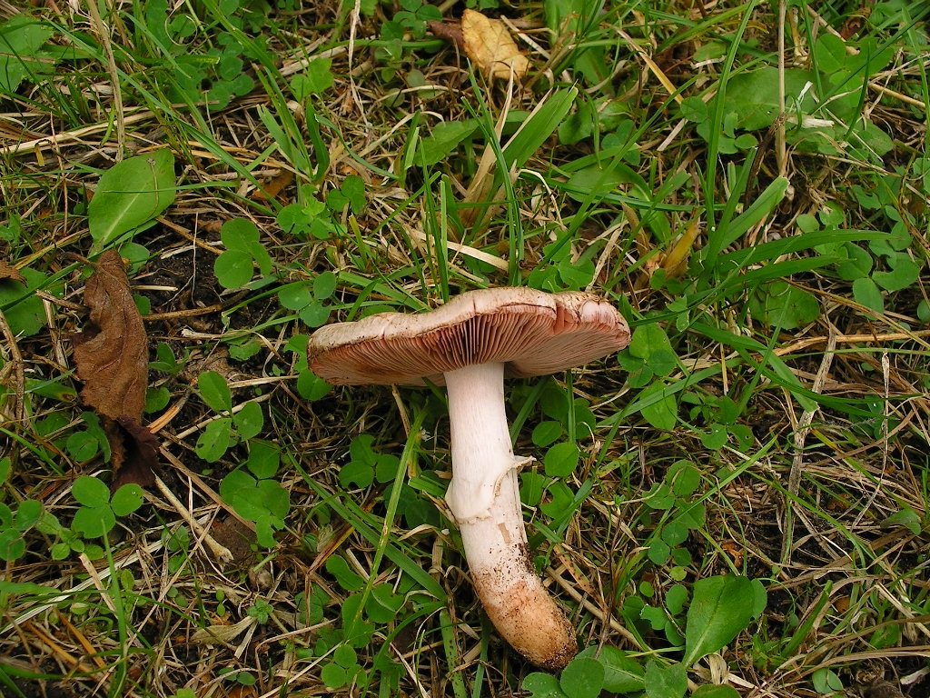 Agaricus langei fotografato in Gotland